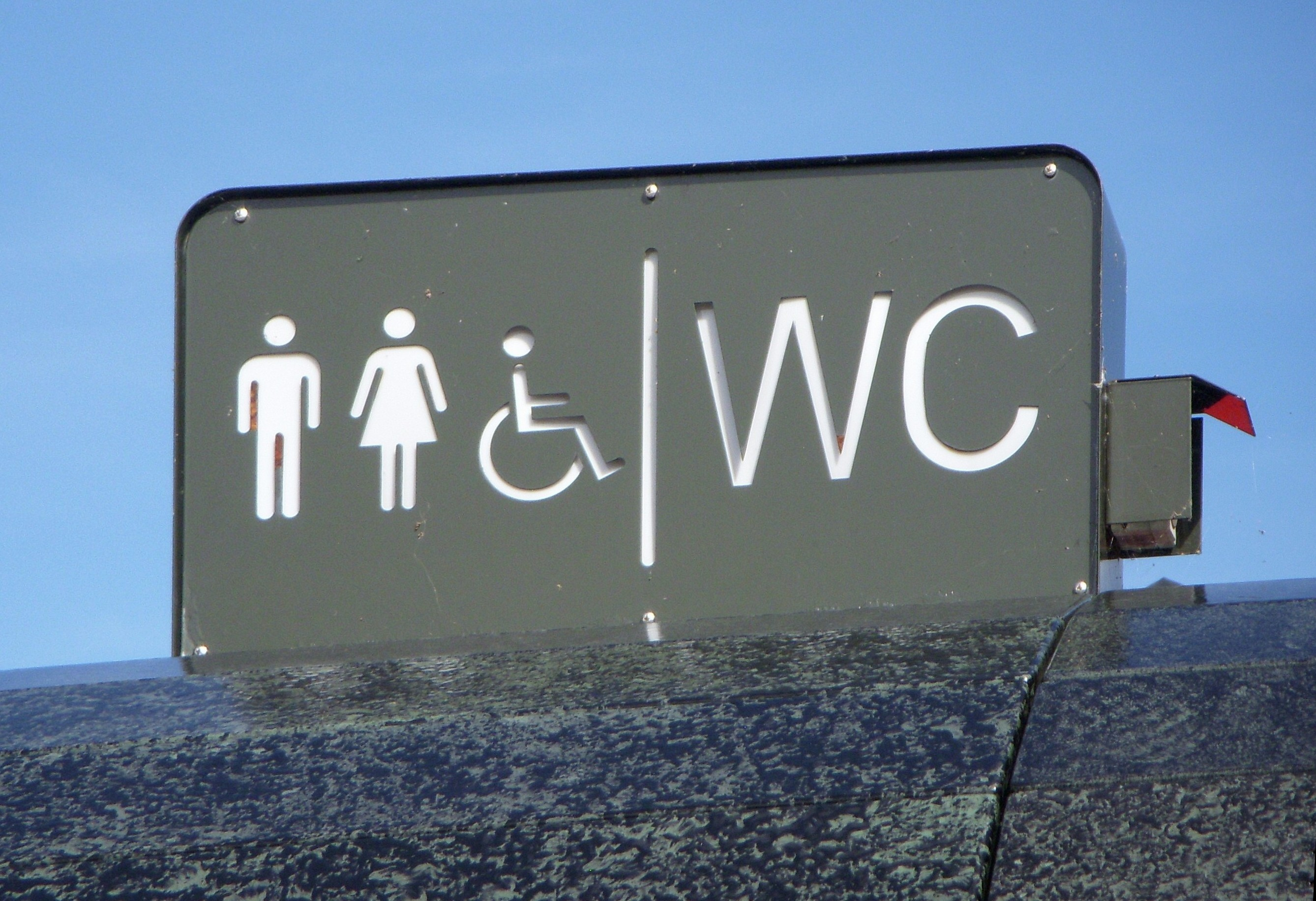 Offentlig toalett i Stockholm, skylt